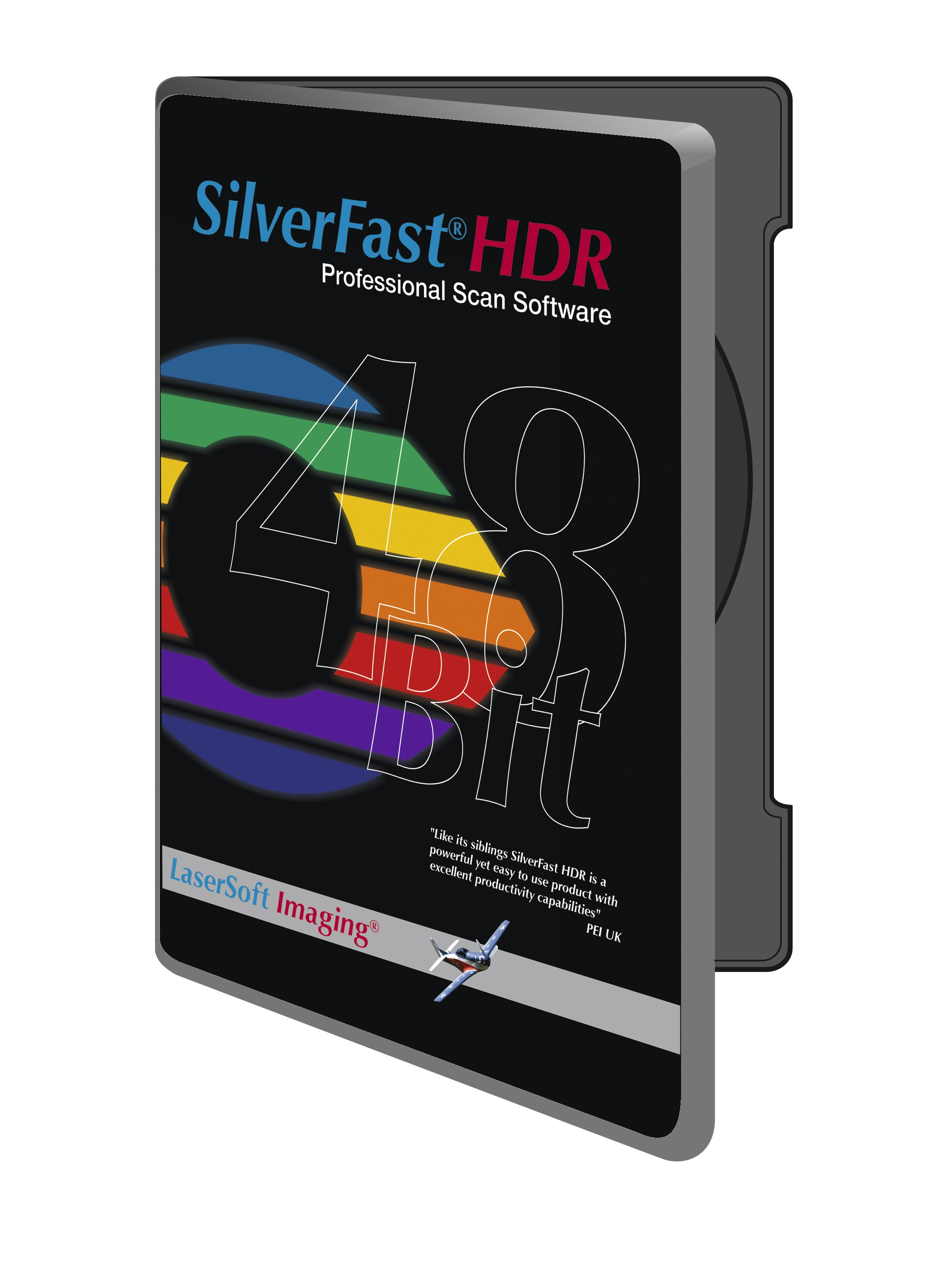 Verpackung SilverFast HDR der Firma LaserSoft Imaging AG